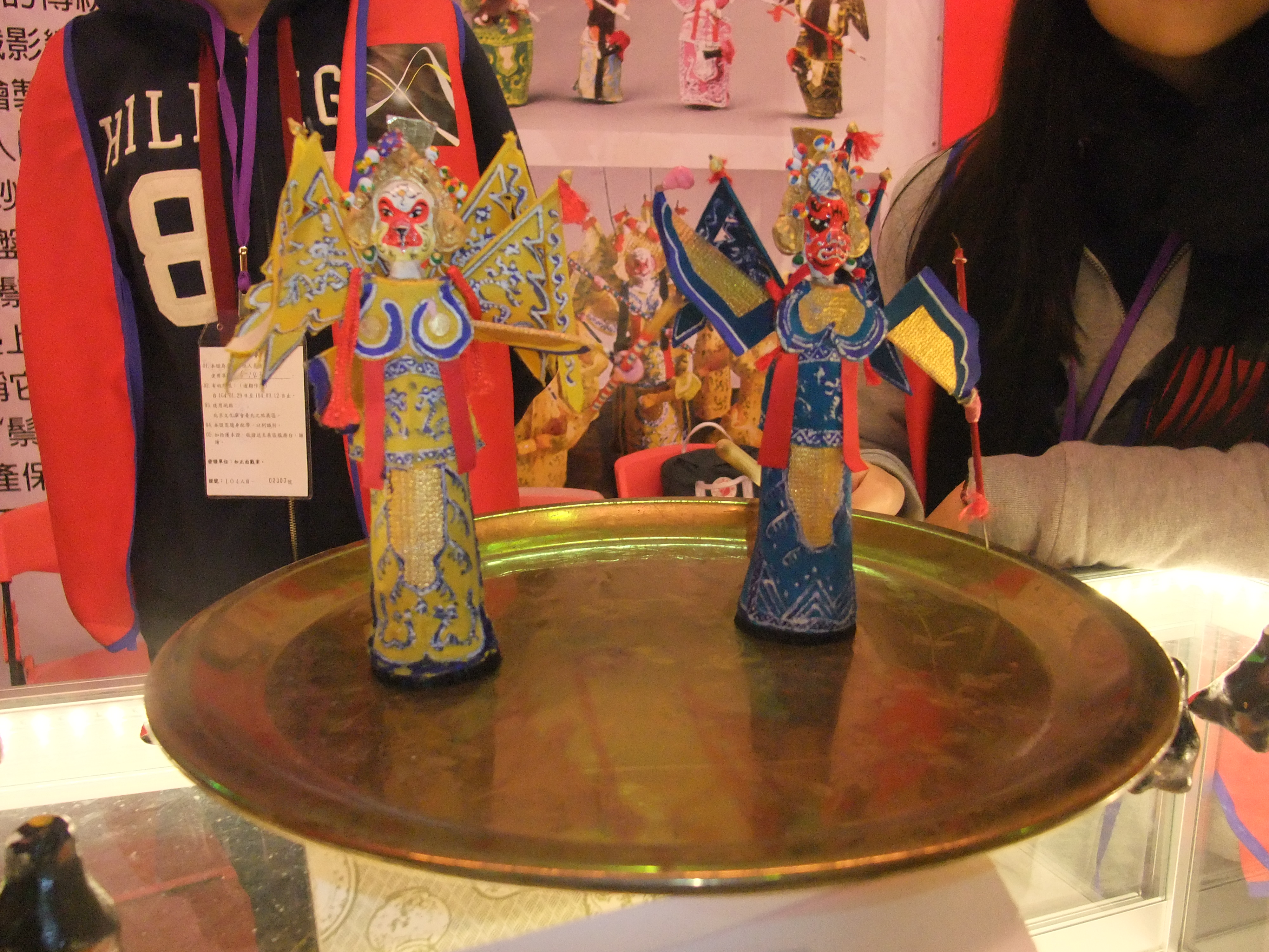 北京的鬚人